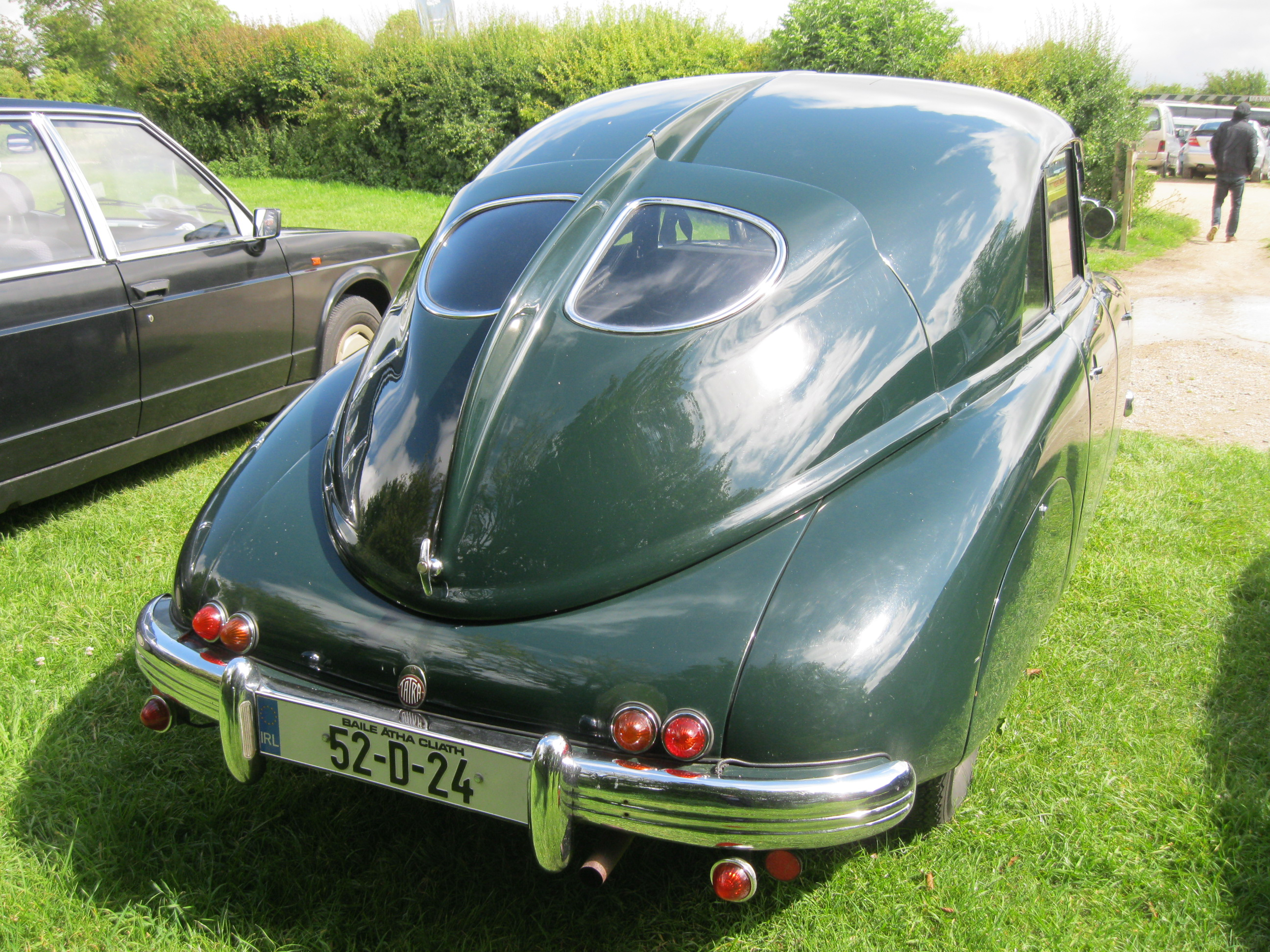 Tatra T600 Tatraplan